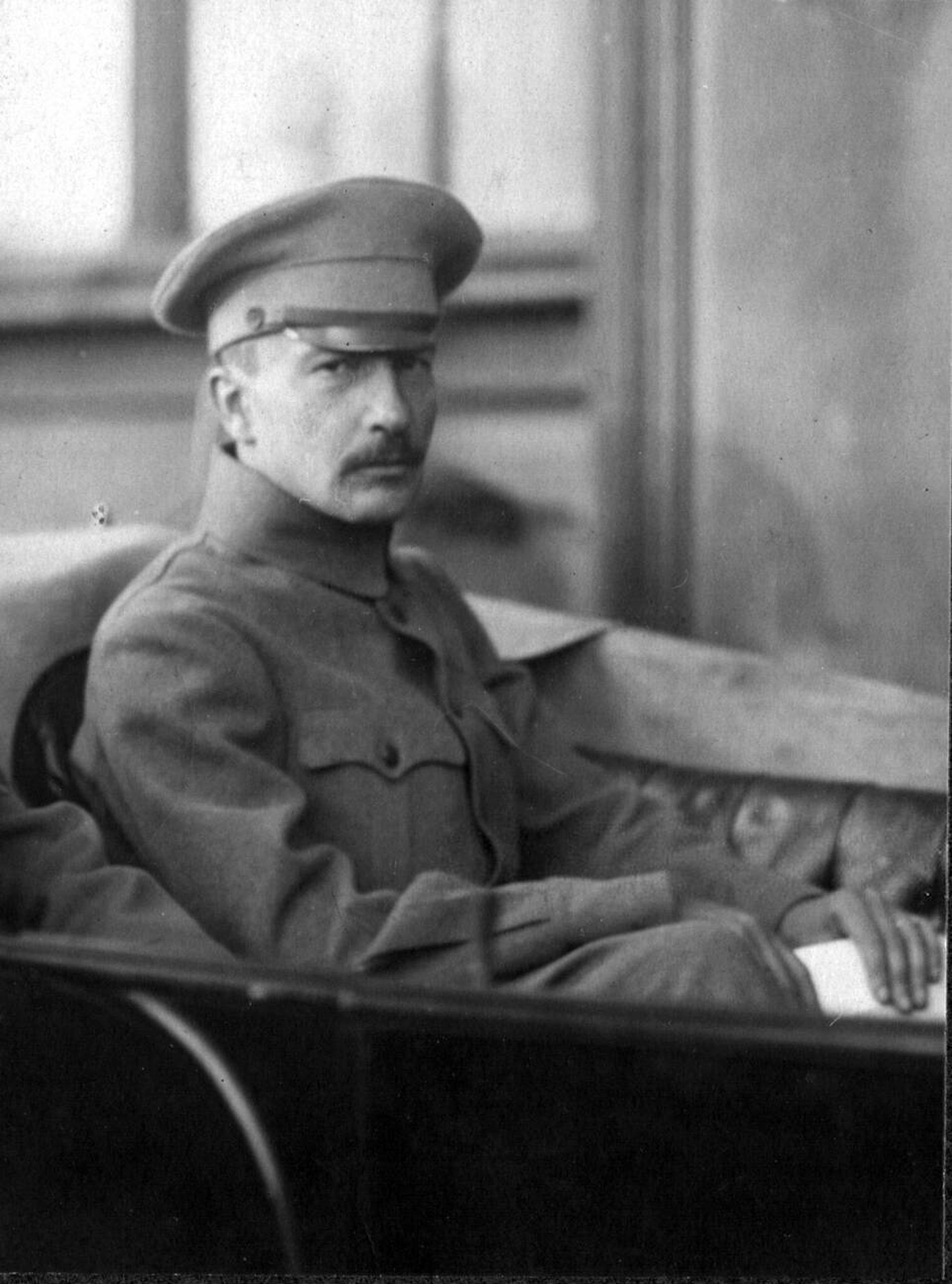 Boris Savinkov, viceministro de Defensa del Gobierno provisional ruso.